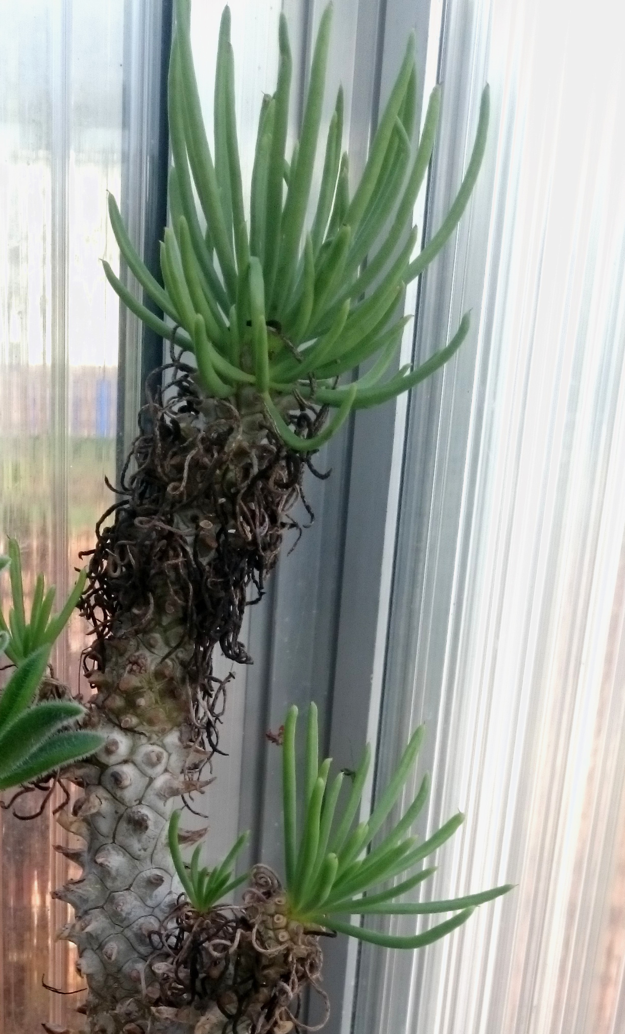 Tylecodon cacalioides